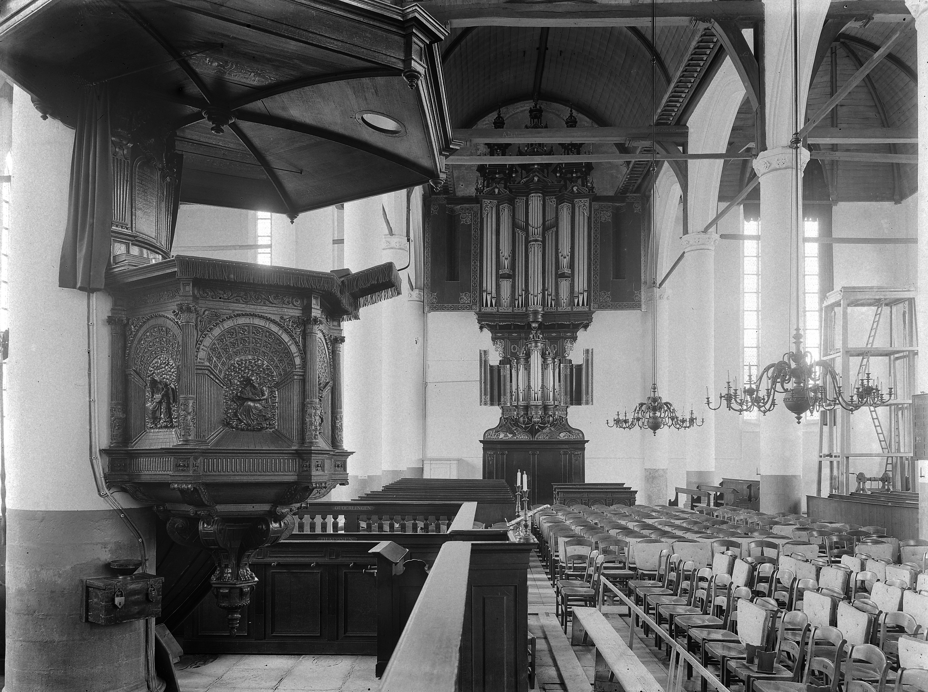 Hervormde Westerkerk: Interieur, preekstoel en orgel (opmerking: In: Buiten ; 12(1918), nr. 41, p. 485)